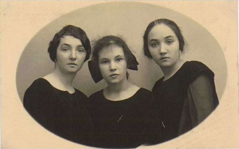 Famill Witry vu Stroossen, fotograféiert vum Paul Kutter.